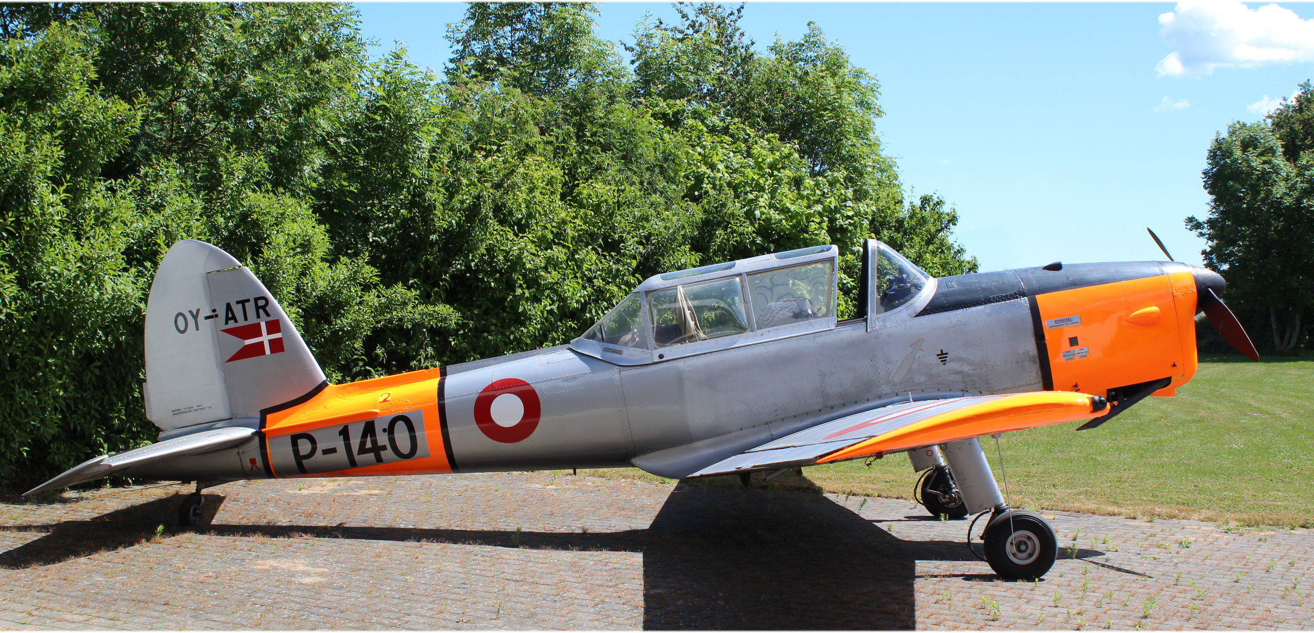 DHC-1 Chipmunk Mk.22 på standpladsen i Sønderborg